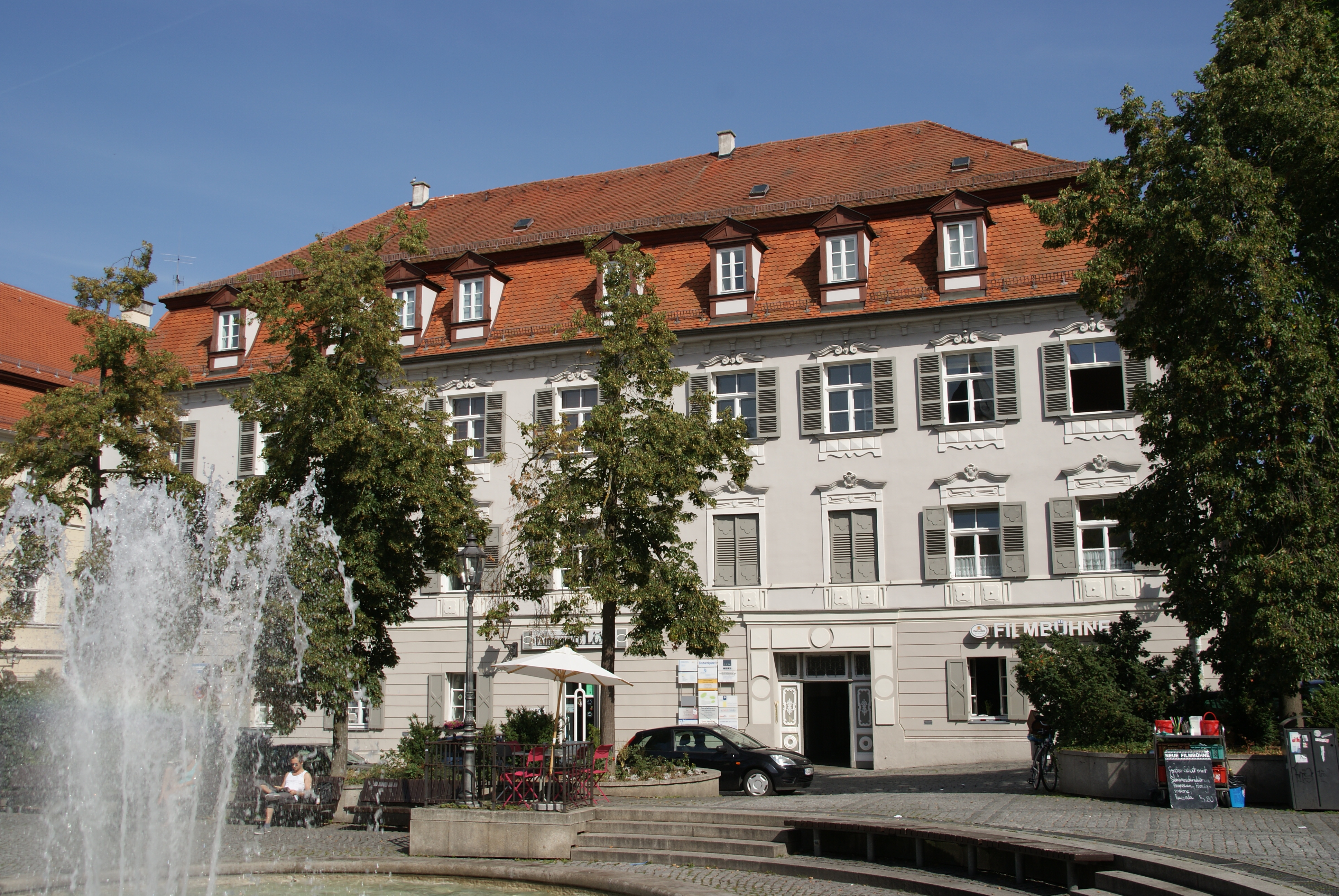 Wohn-und Geschäftshaus, ehem. Württembergische Gesandtschaft. vierflügeliger und dreigeschossiger Mansardwalmdachbau in Ecklage, spätgotisch mit, romanischer Substanz, überformt in der 2. Hälfte 18. Jh., Fassadenstuck 1987 rekonstruiertThis is a photograph of an architectural monument.